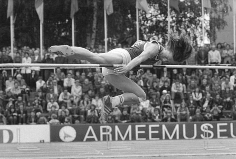 Rosemarie Ackermann ADN-ZB Kaufhold 16.7.80-Lau-Cottbus. DDR-Meisterin im Hochsprung bei den 31. DDR-Meisterschaften in der Leichtathletik wurde Rosemarie Ackermann mit 1,94 Metern.